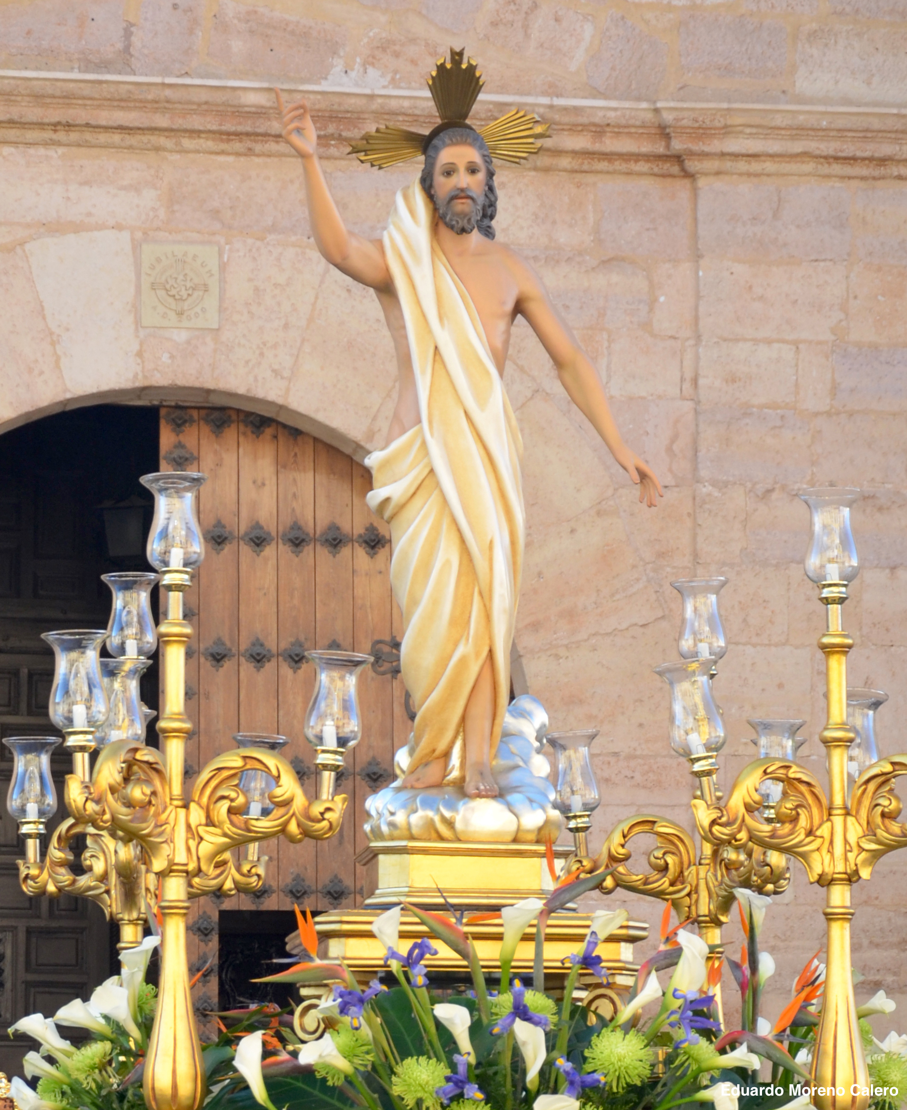 Imagen de Jesús Resucitado de la Real Cofradía del Santo Sepulcro y de la Soledad de Villarrobledo